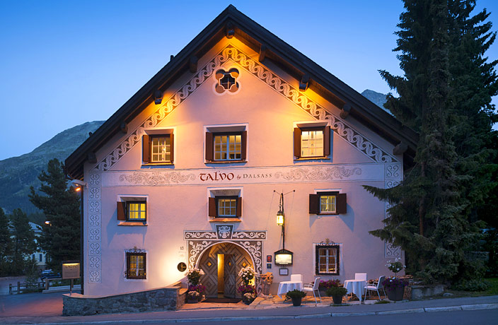 Eingangsfassade des Restaurant Talvo mit Sgraffitto Verzierungen in Champfèr